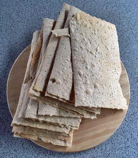 Flatbrød